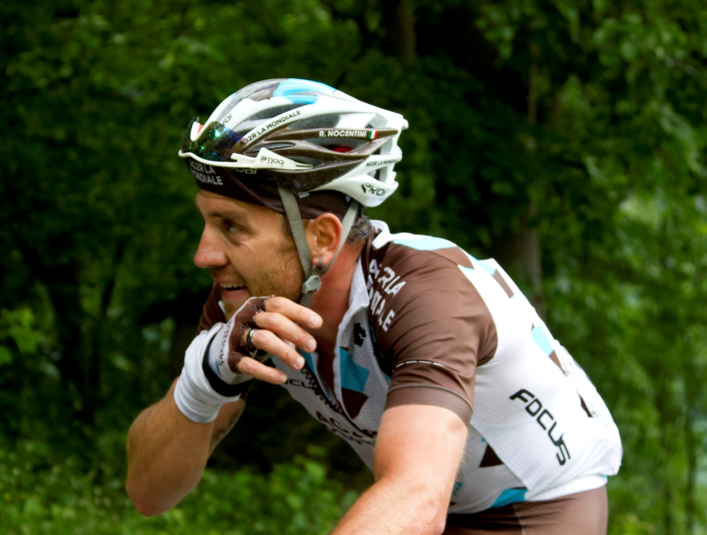 132 nocentini